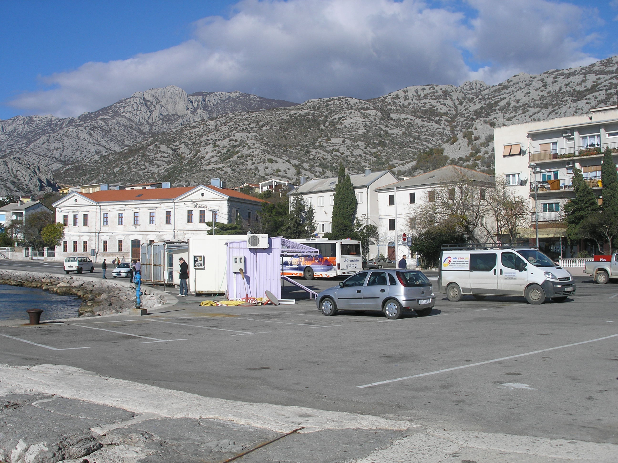 Karlobag, Croatia